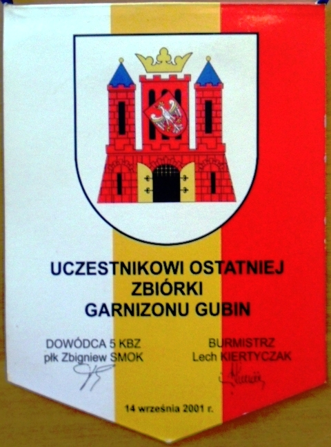 Pamiątkowy proporczyk